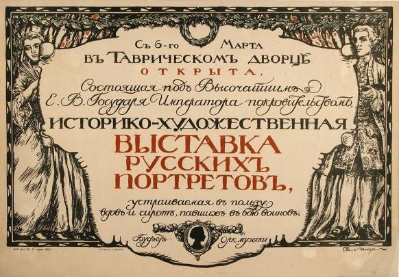 Афиша Историко-художественной выставки русских портретов. 1905 Цветная литография 45,5 х 65,5